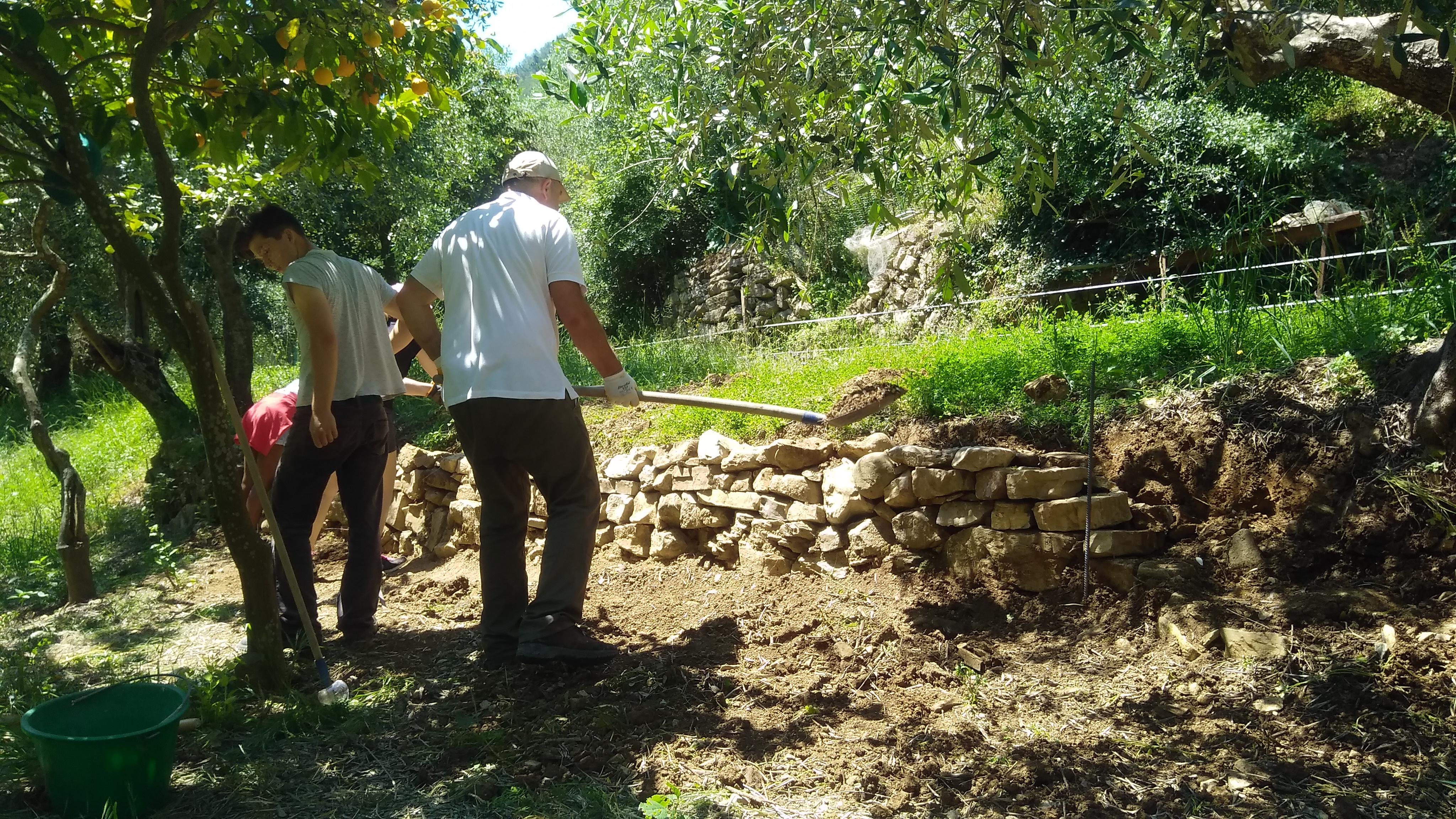 Monte Grammondo - Torrente Bevera (Q47502132)